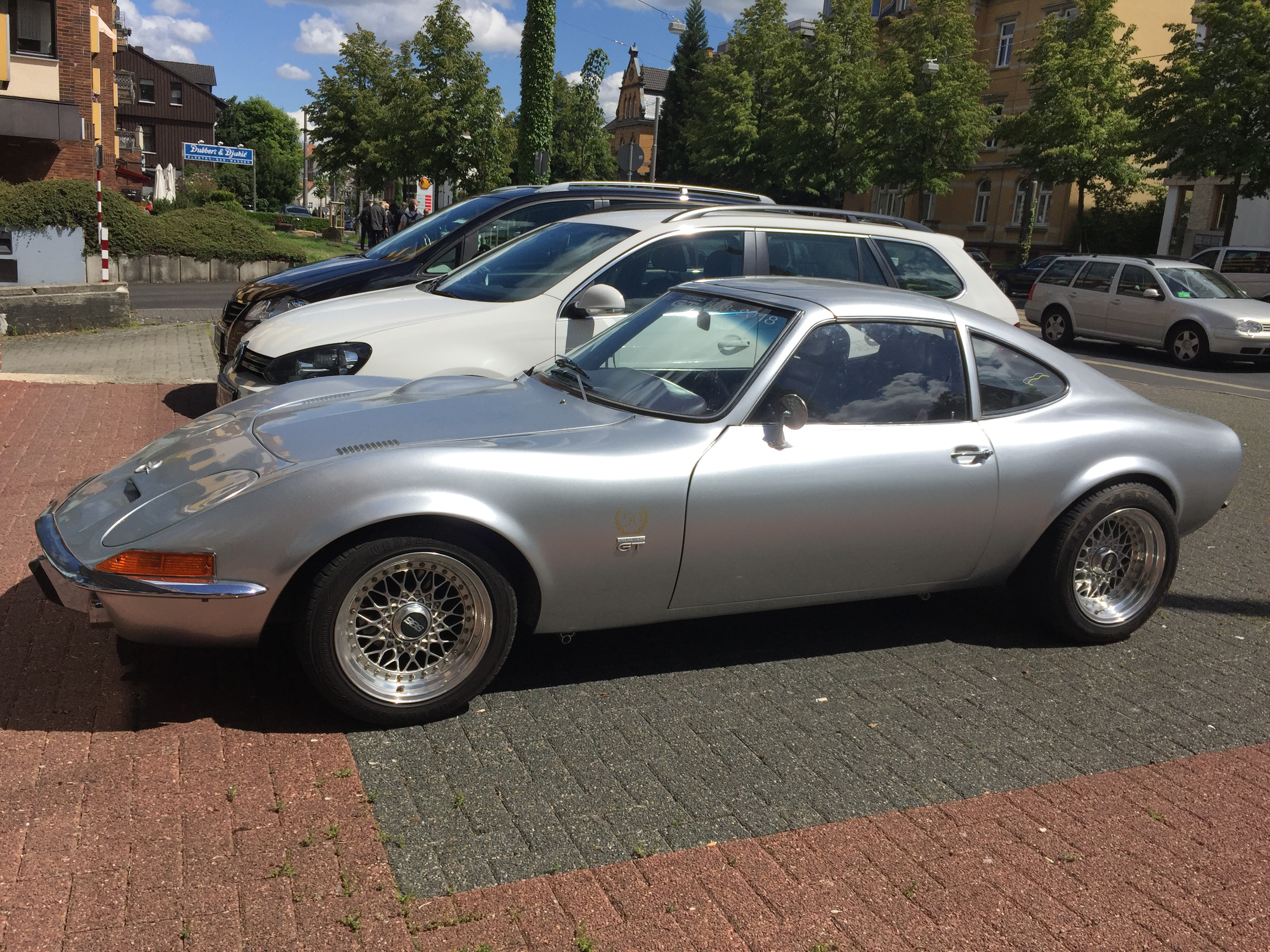 Opel GT Targa-Umbau Seitenansicht